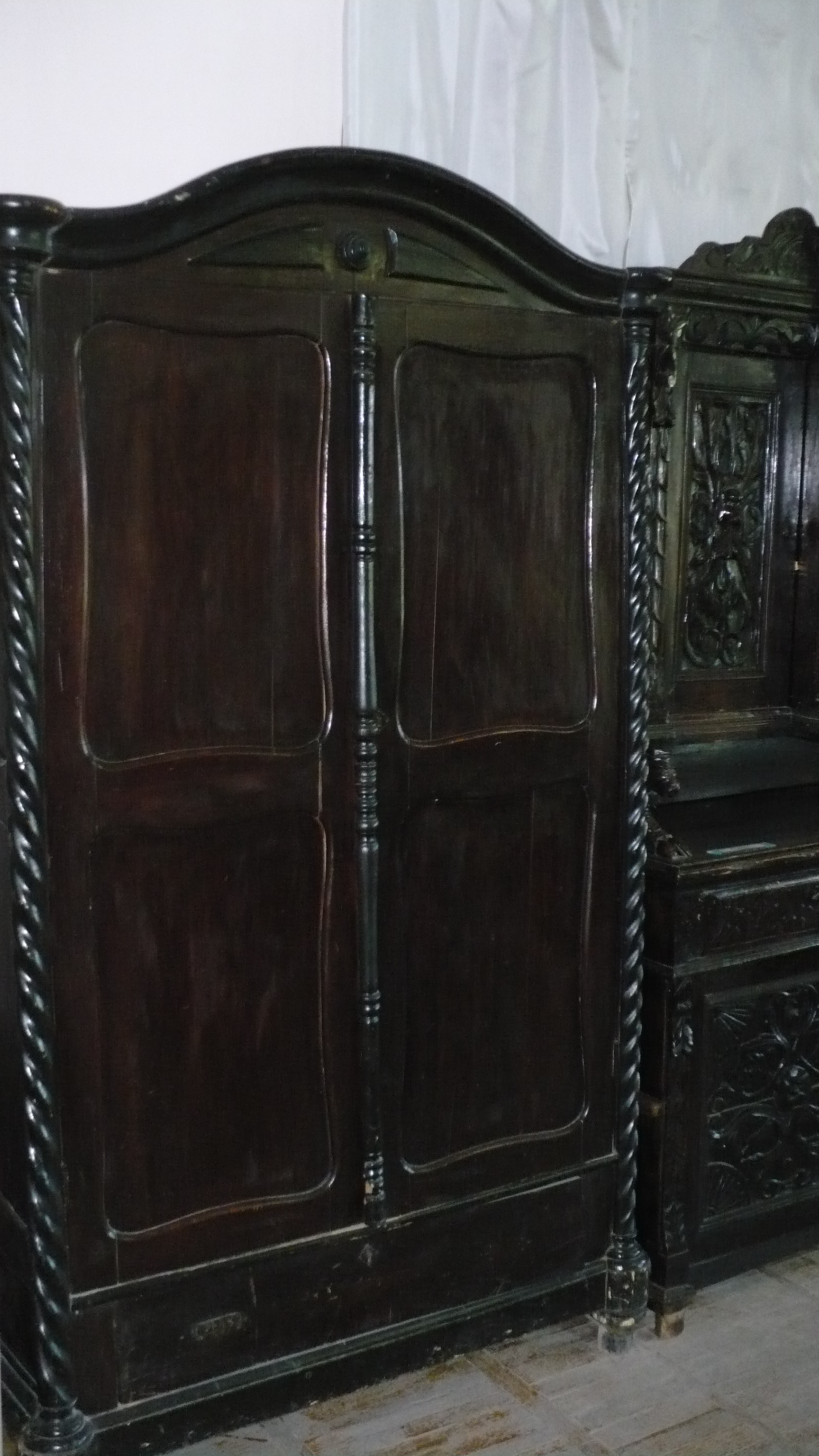 Миргородський Краєзнавчий музей (усередині 29). Внутрішній вигляд Миргородського Краєзнавчого музею